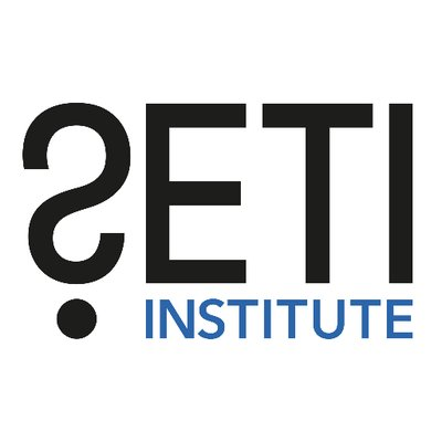 Logotipo del instituto SETI.